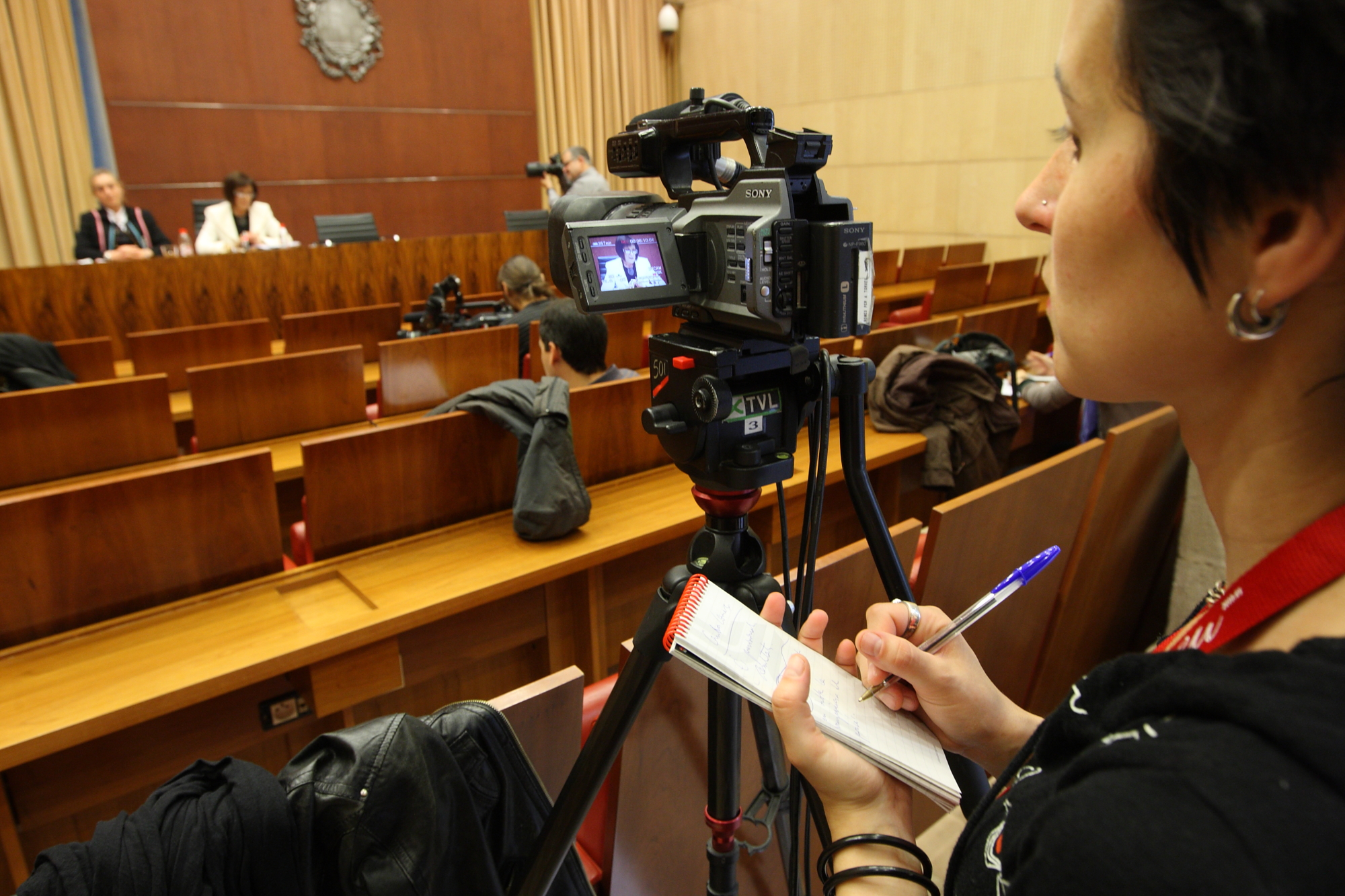 Roda de premsa a la Casa Llotja de Mar, seu corporativa de la Cambra de Comerç de Barcelona, per a presentar els resultats provisionals de les eleccions a la Cambra, celebrades el 4 de maig de 2010.